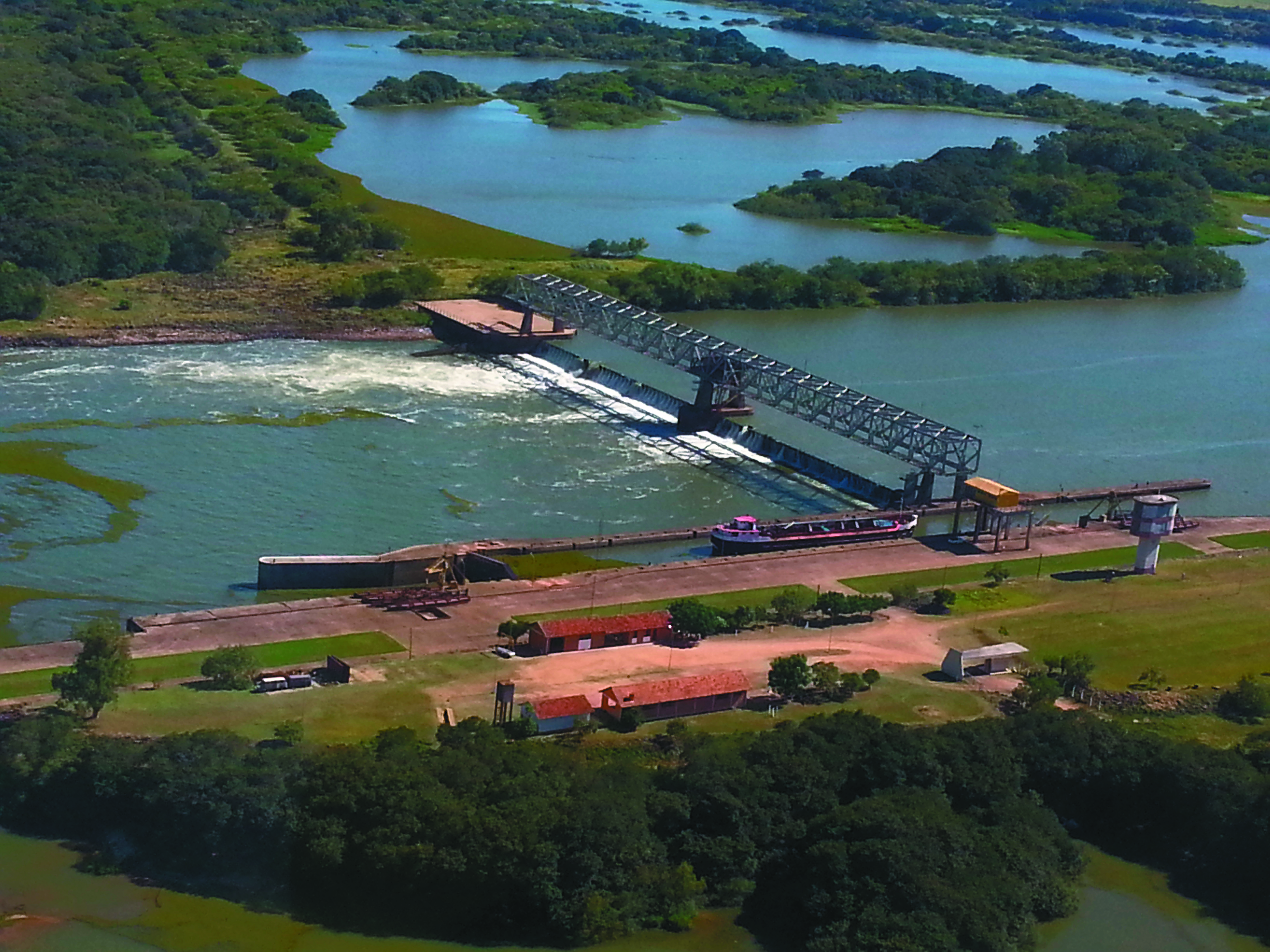 Barragem construída na década de 70 que permite a navegação no Rio Jacuí